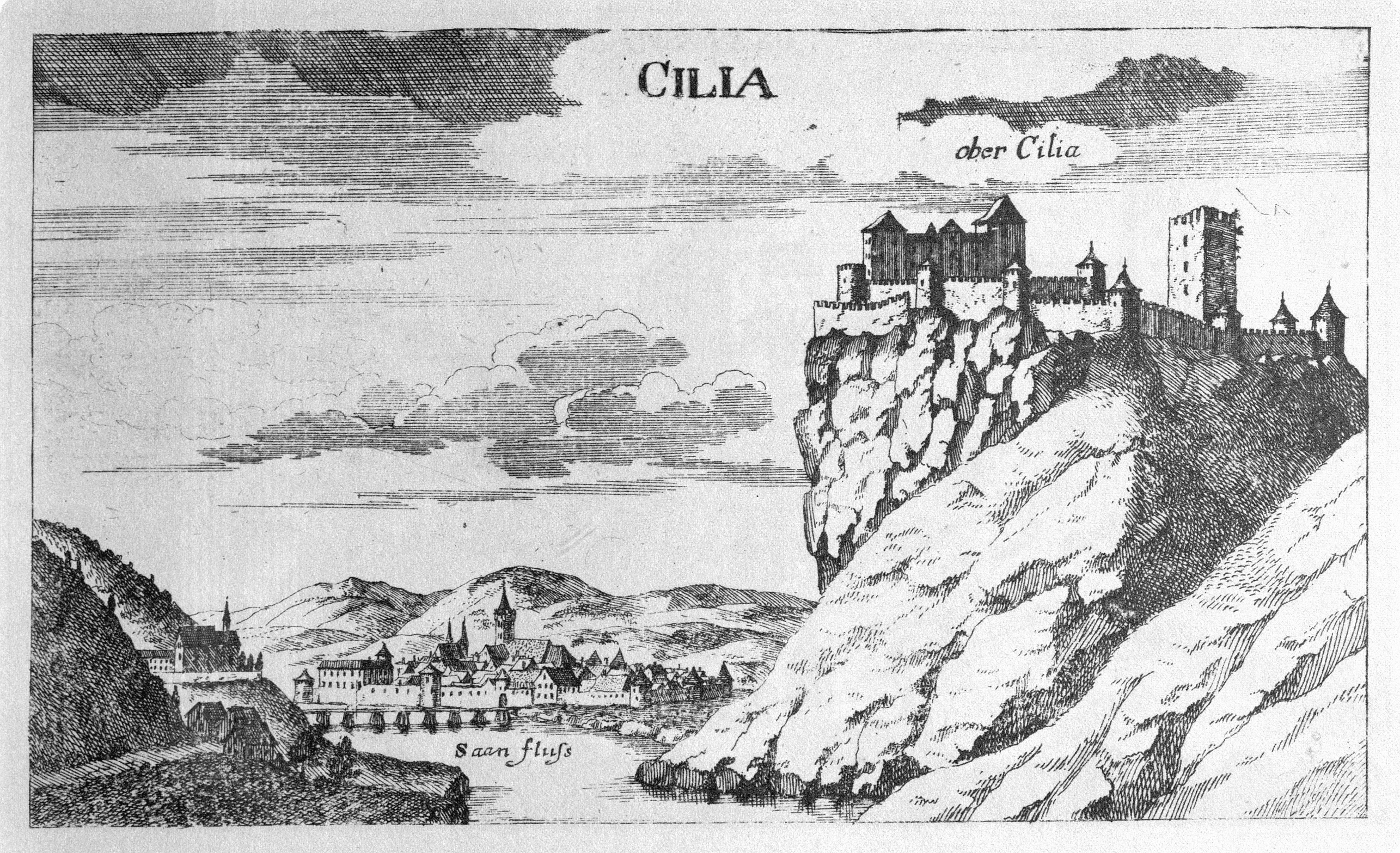 G. M. Vischers Käyserlichen Geographi, Topographia Ducatus Stiriae, Das ist: Eigentliche Delineation / und Abbildung aller Städte / Schlösser / Marcktfleck / Lustgärten / Probsteyen / Stiffter / Clöster und Kirchen / so es sich im Herzogthumb Steyrmarck befinden; Und anjetzo Umb einen billichen Preyß zu finden seynd Bey Johann Bitsch Universitäts Buchhandlern / Auff dem Juden=Platz bey der guldenen Saulen. Graz 1681 Die Nummerierung der Dateien folgt der alphabetischen Reihung der Orte